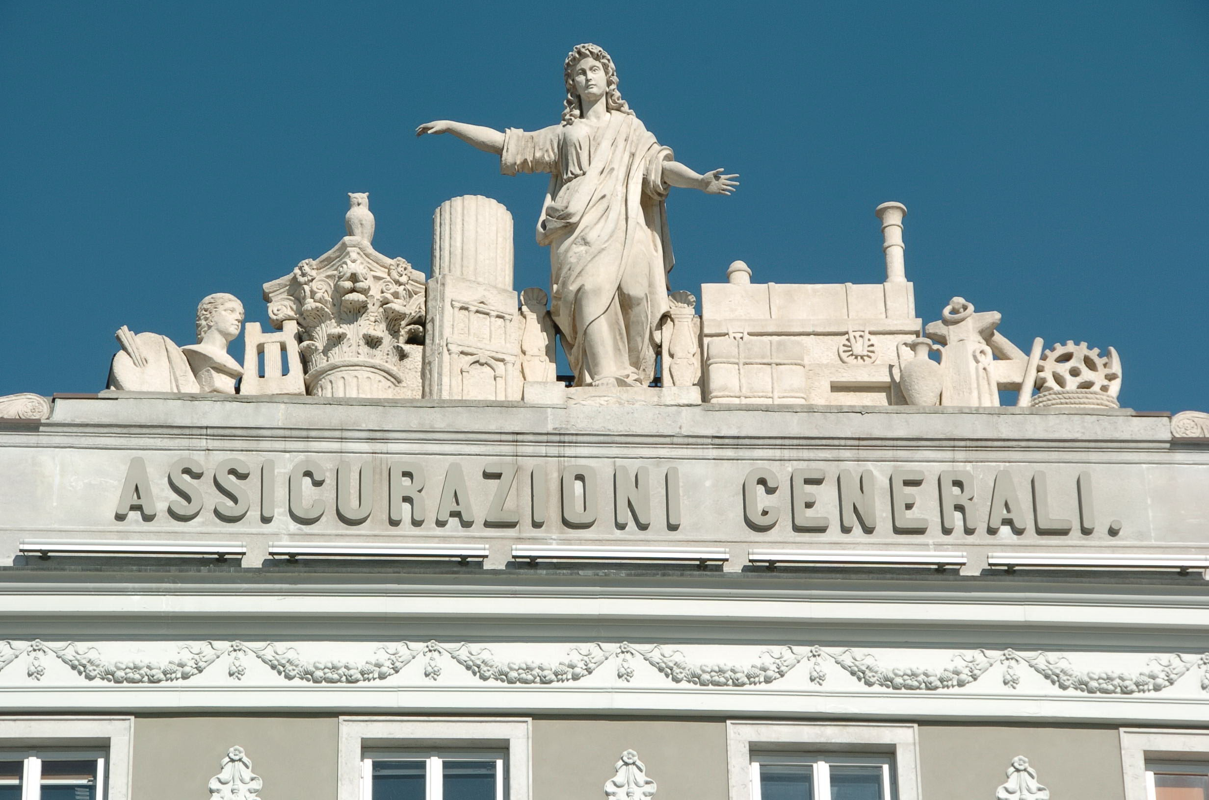 Front detail of Assicurazioni Generali, Piazza dell`Unitá, Trieste, Italy